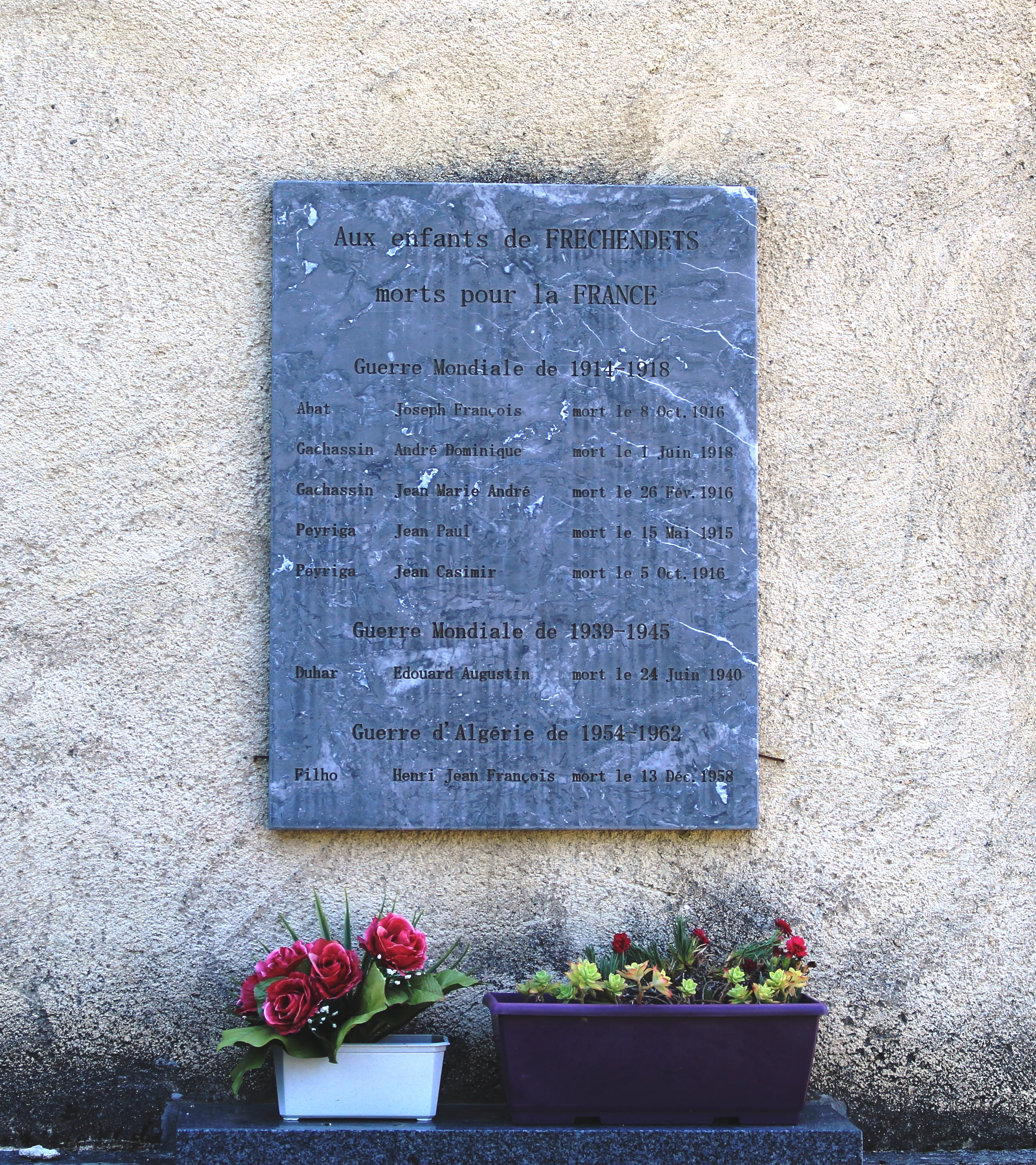 Monument aux morts de Fréchendets (Hautes-Pyrénées)